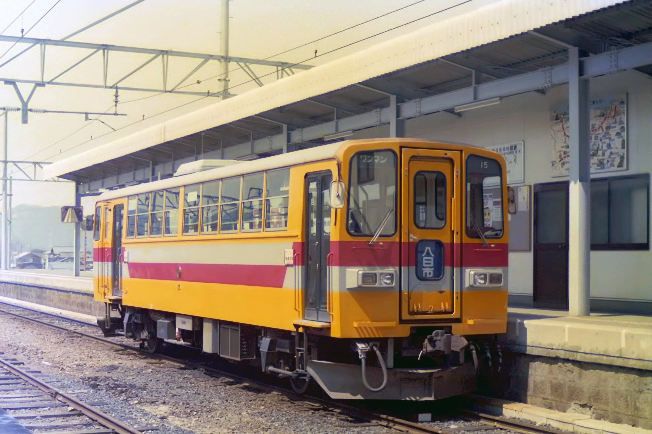 近江鉄道キハ15 貴生川駅